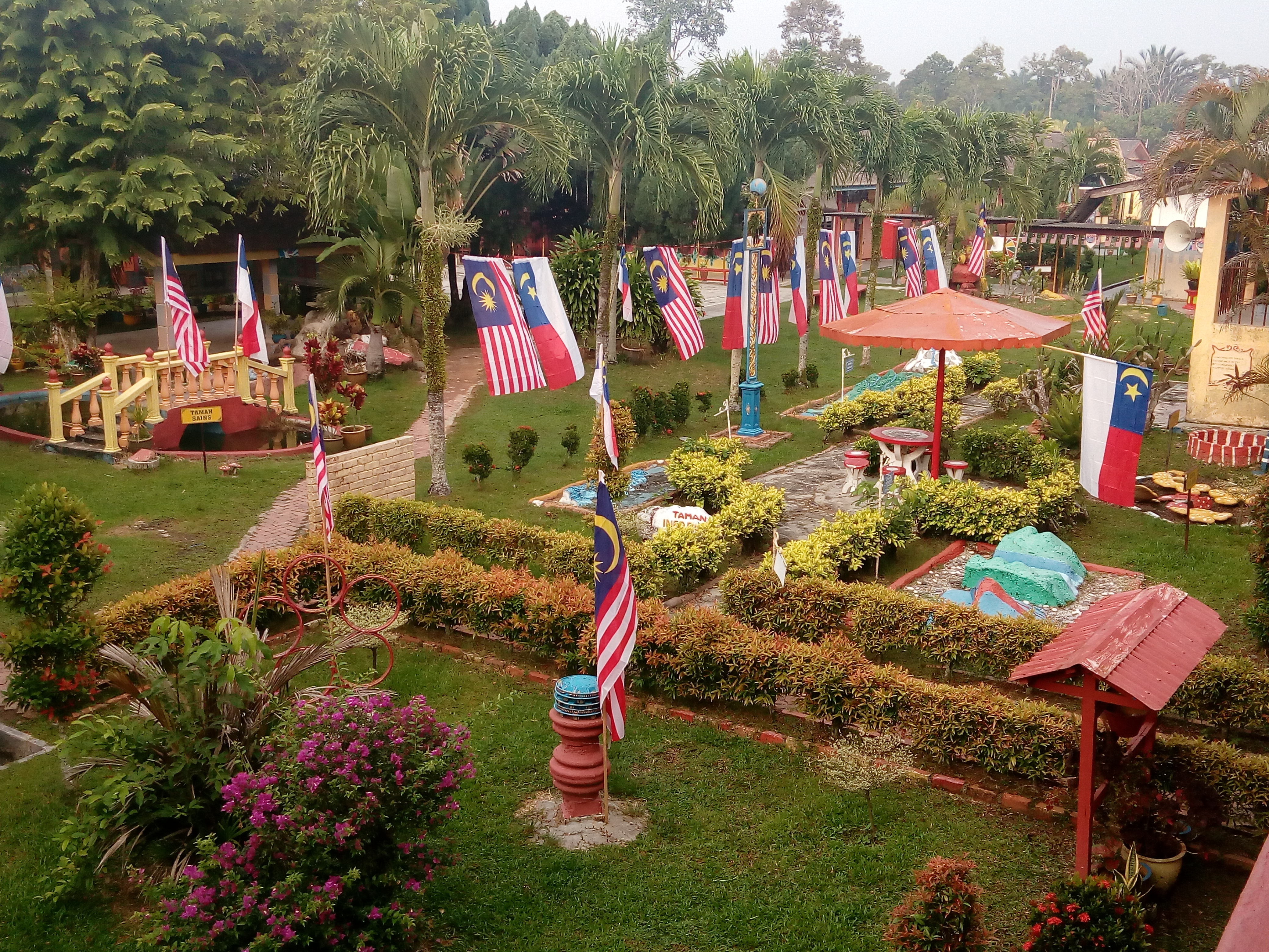 persekitaran smksr hias bendera